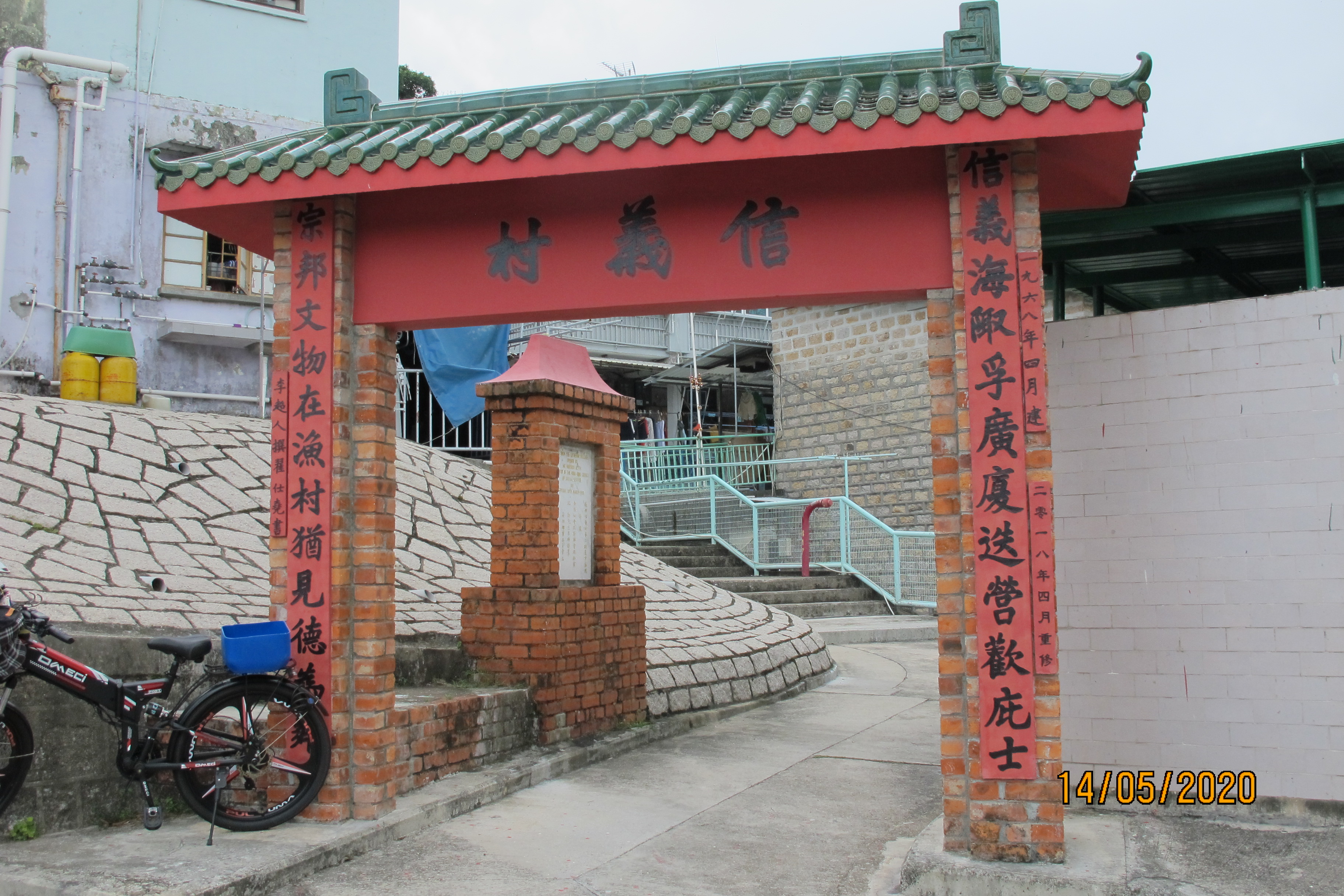 中文（香港）: 信䕏村(長洲)